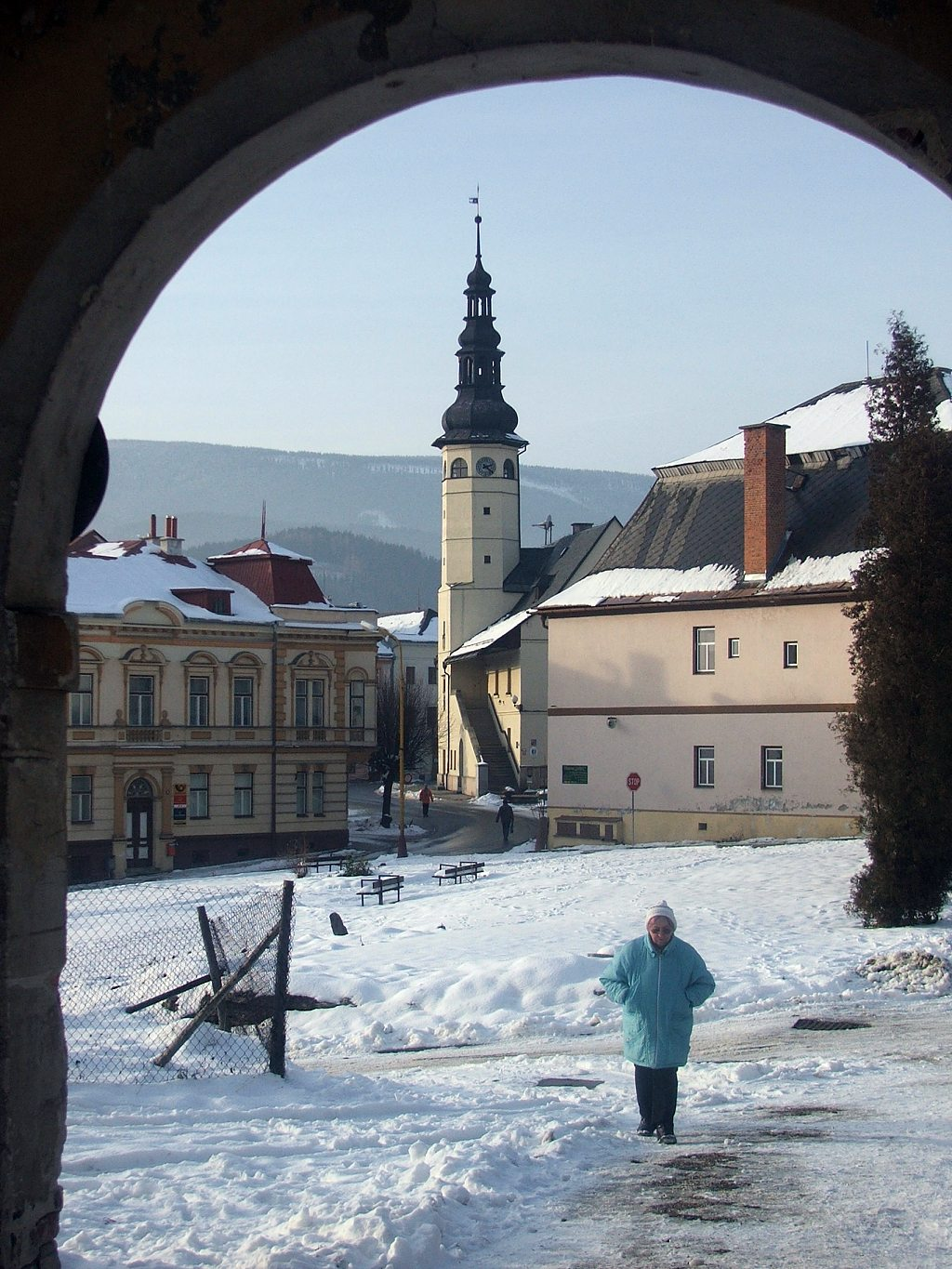 Staré Město pod Sněžníkem (Czechy). Widok spod bramy kościoła